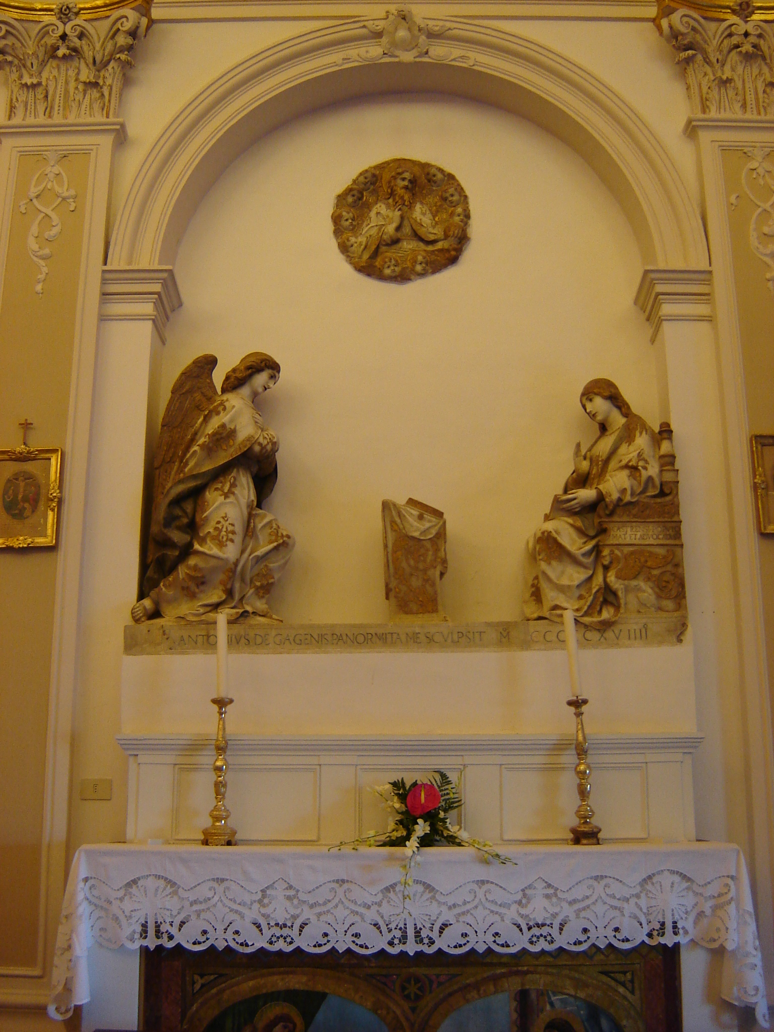 Annunciazine di A. Gagini.Chiesa di S. Agata in Castroreale.Foto personale.Agosto 2006